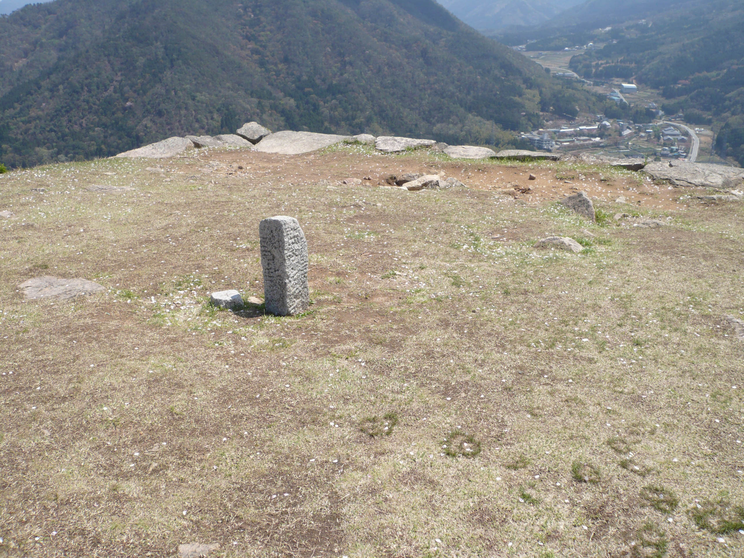 天守台の頭頂部